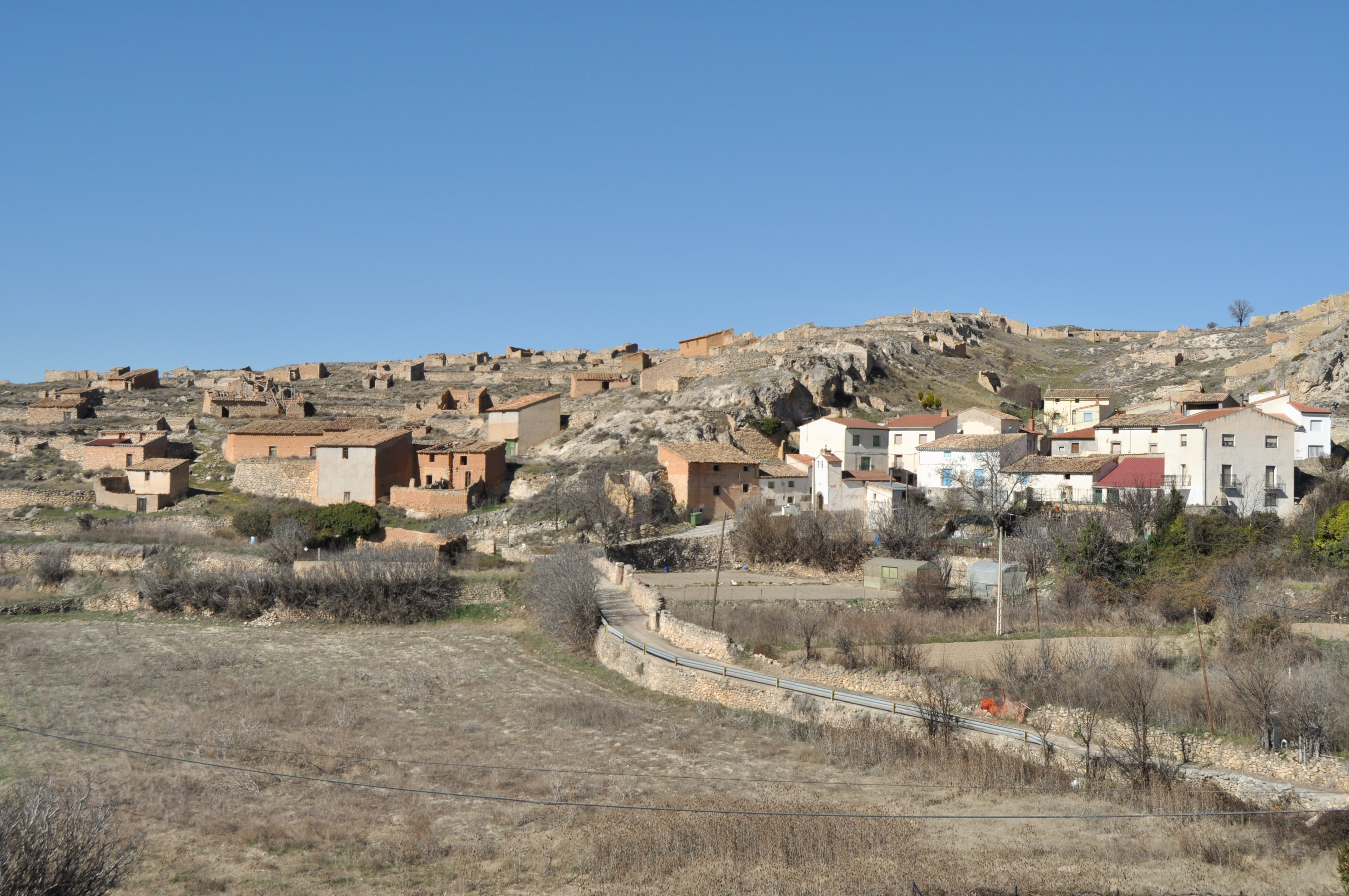 Deza - 015